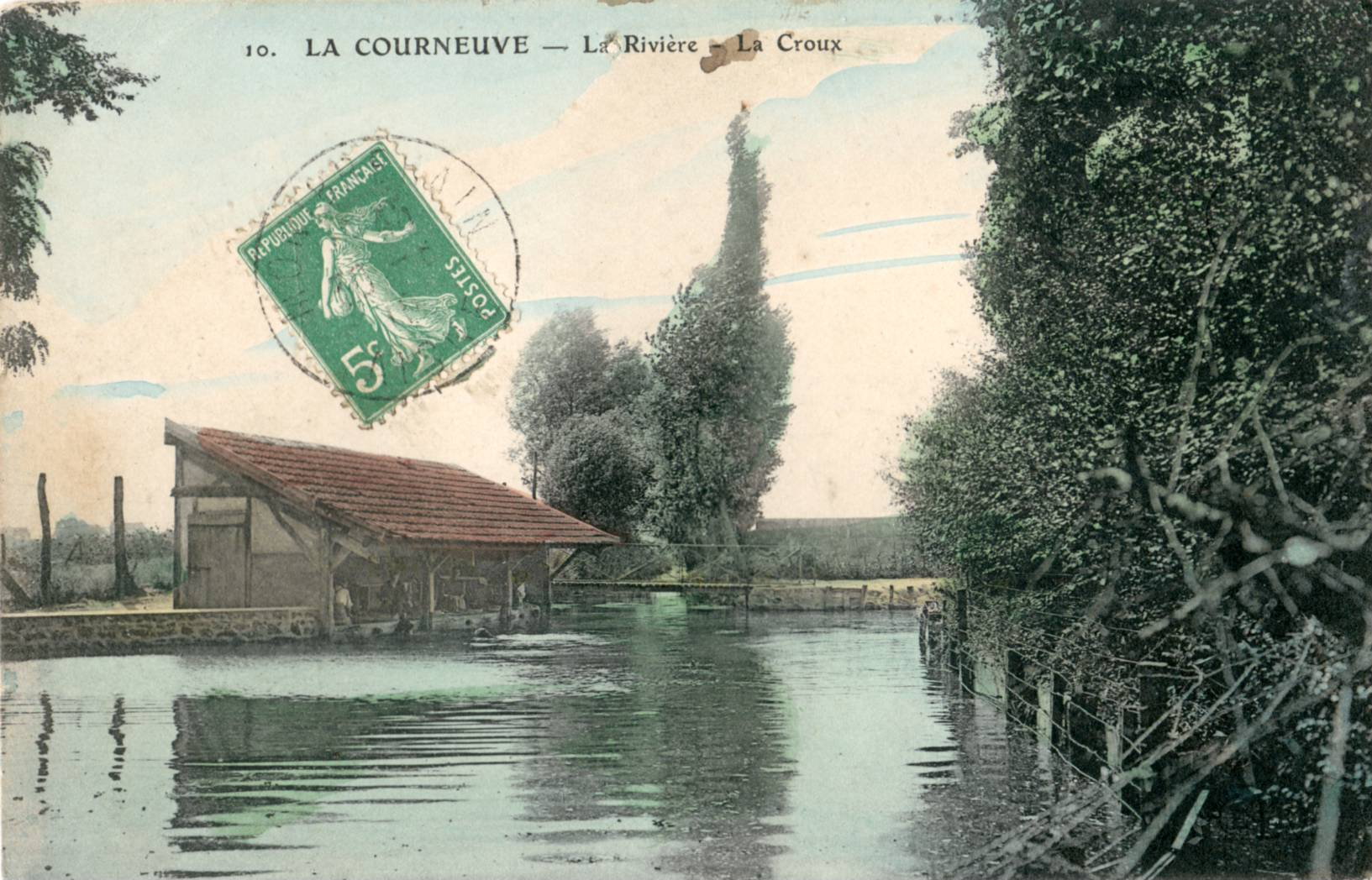 Carte postale ancienne, sans nom d'éditeur, N0 10 LA COURNEUVE : La Rivière - la Croux (Le Croult)